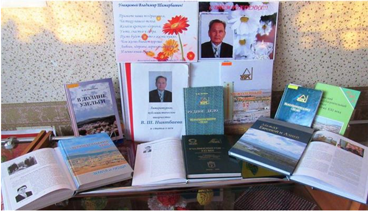 Книги Владимира Шамарбаевича